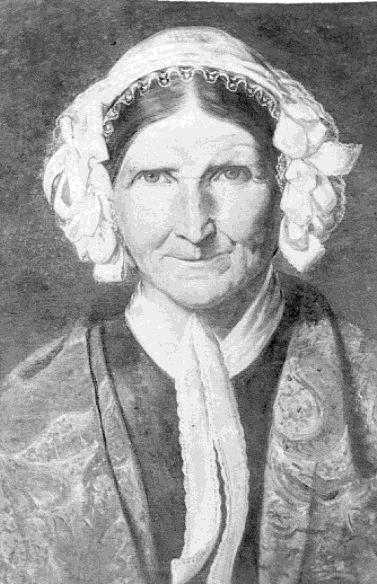 Thérèse Evrard, épouse de Xavier Sodar, peinte par son fils Franz. Portrait brûlé en 1914, lors du bombardement de Dinant (Saint-Médard) par les Allemands. Fichier scanné par Bruno Van Eeckhout, tiré d'une photographie originale provenant du patrimoine de la famille Van Eeckhout.